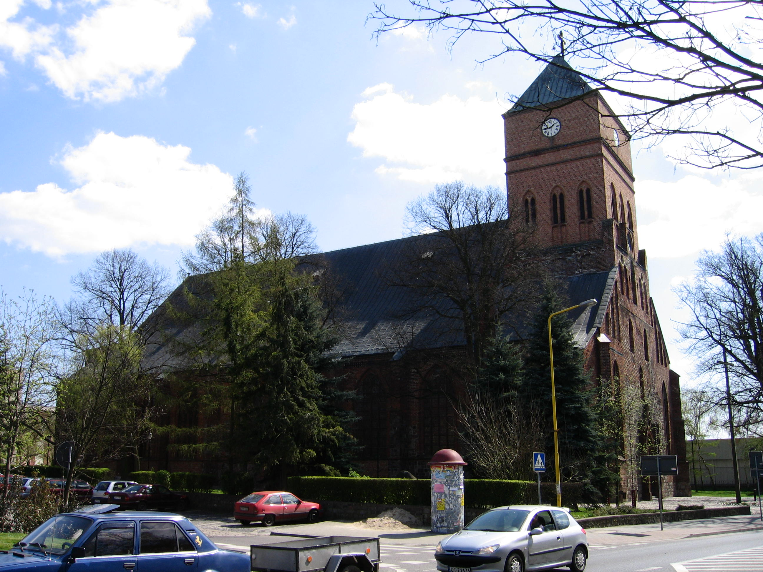 Pyrzyce, pl. Ratuszowy - kościół parafialny p.w. św. Maurycego, obecnie p.w. Wniebowzięcia NMP